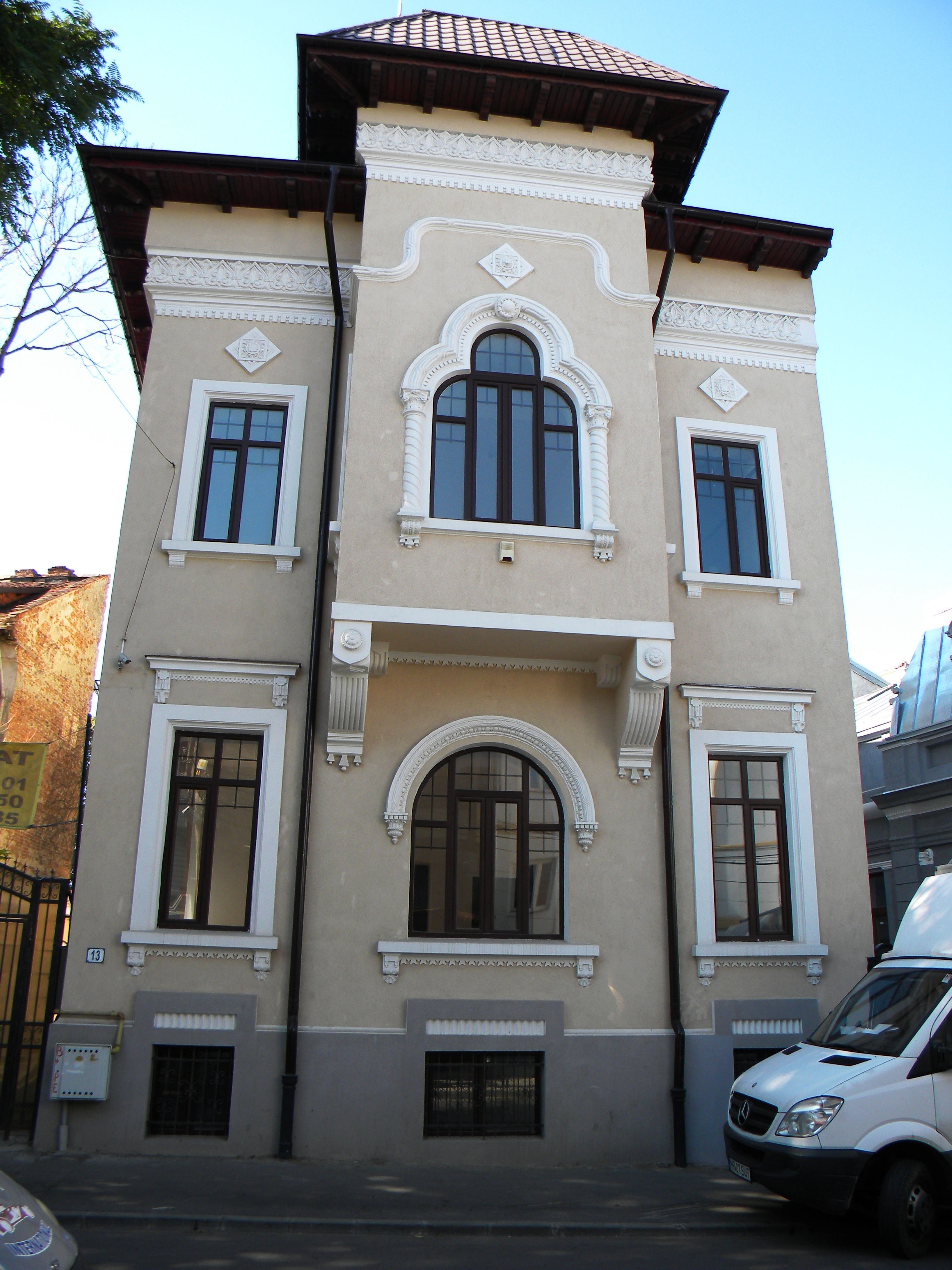 Bucuresti, Romania, Casa pe Str. Iulia Hasdeu, nr. 13, sect. 1